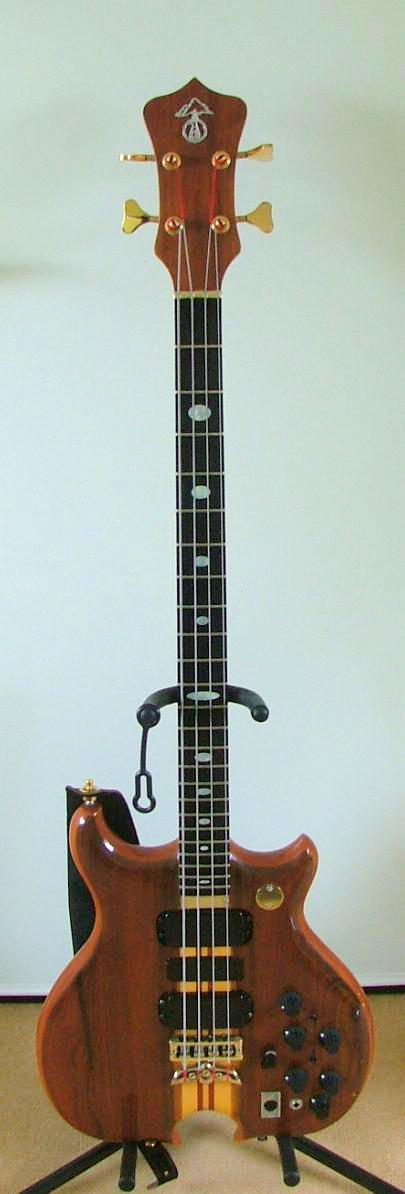 1978 Alembic Series 1 Custom